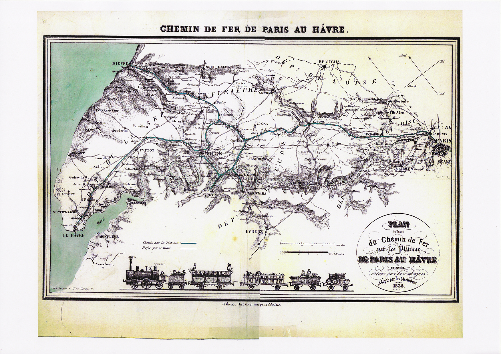 Chemin de fer de Paris à la mer : plan du chemin de fer par les Plateaux de Paris au Havre - 1838.